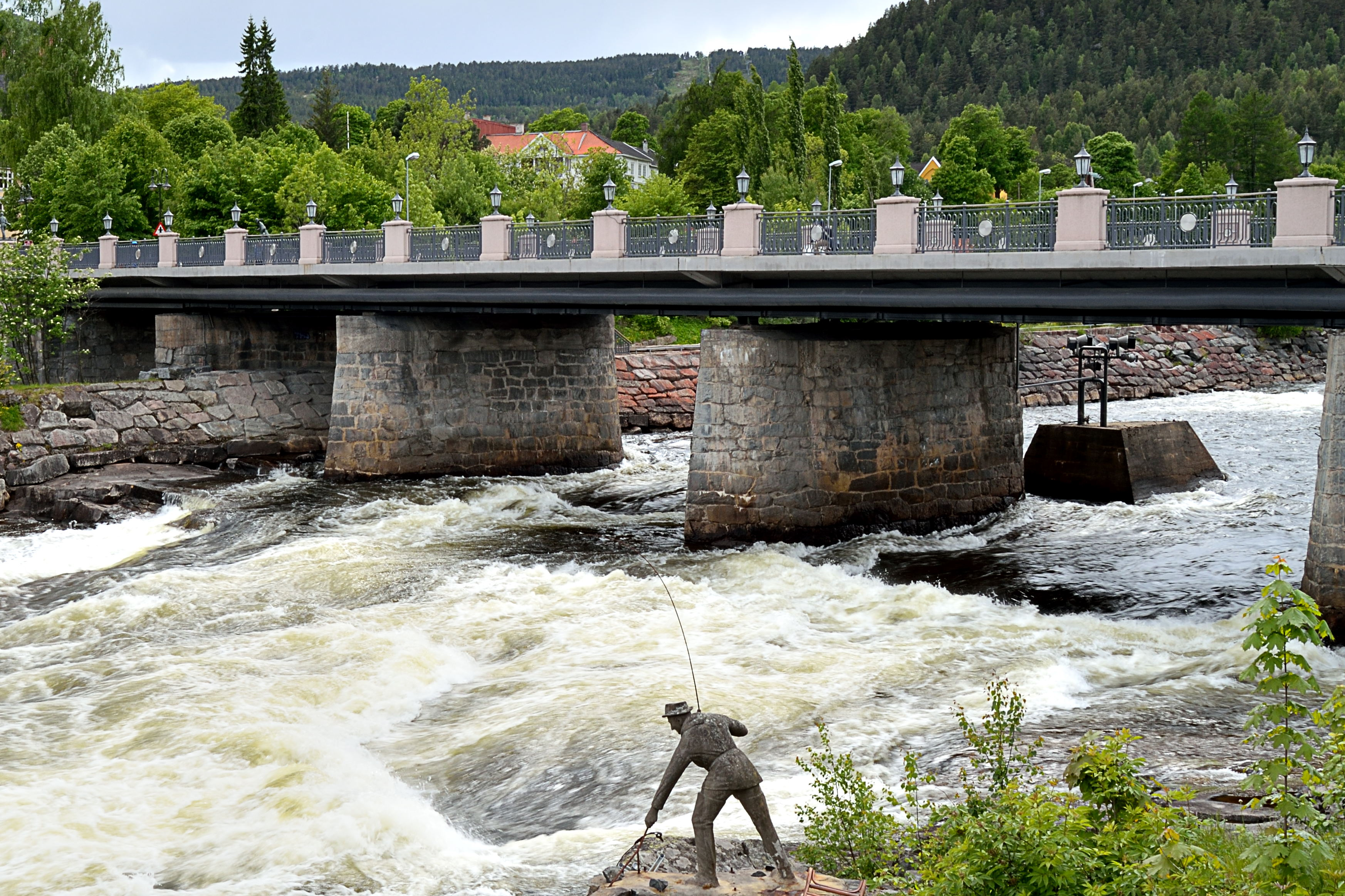 Storgata bru Kongsberg